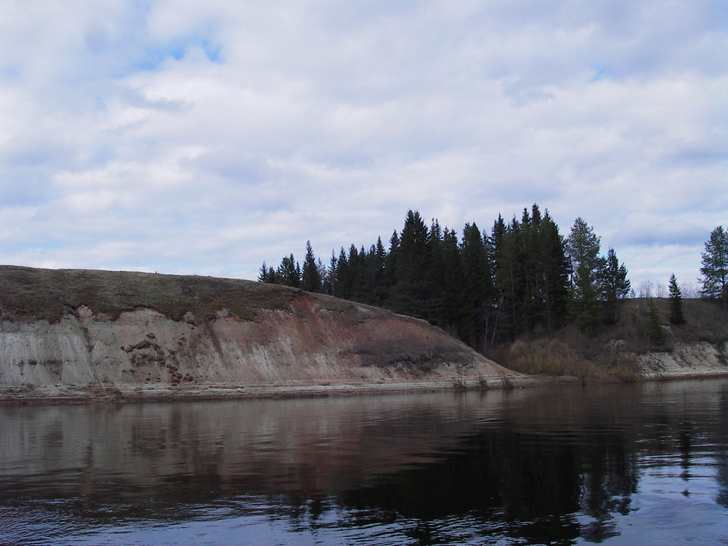 Река Устья в верхнем течении.